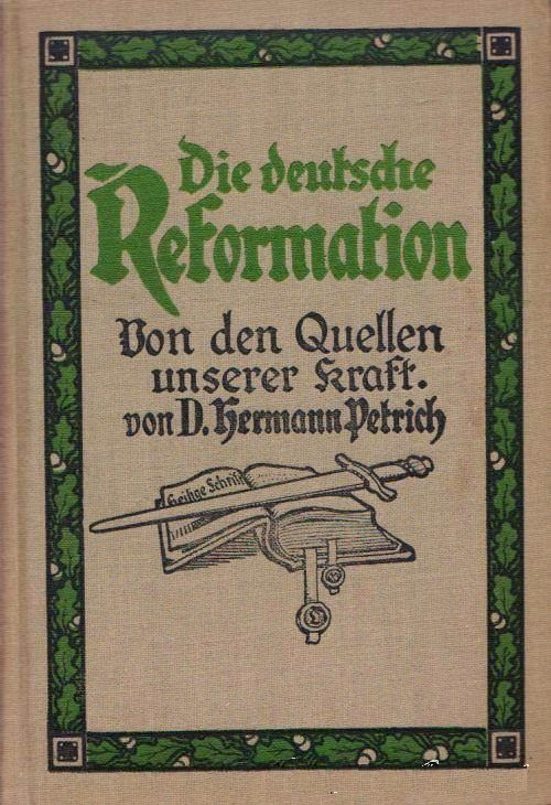 Hermann Petrich: Die deutsche Reformation. Von den Quellen unserer Kraft. Hamburg (Rauhes Haus) 1916, Einbanddeckel